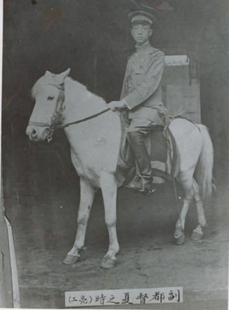 副都督夏之时